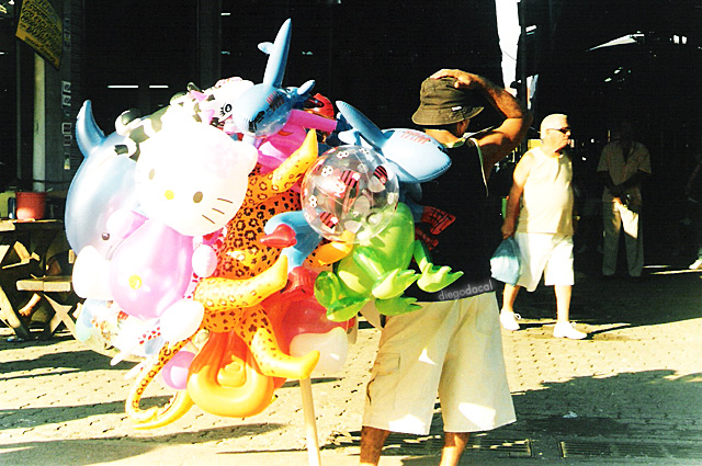 Street vendor in Rio de Janeiro, Brazil. Vendedor ambulante na Feira de São Cristóvão, no Rio de Janeiro, Brasil.